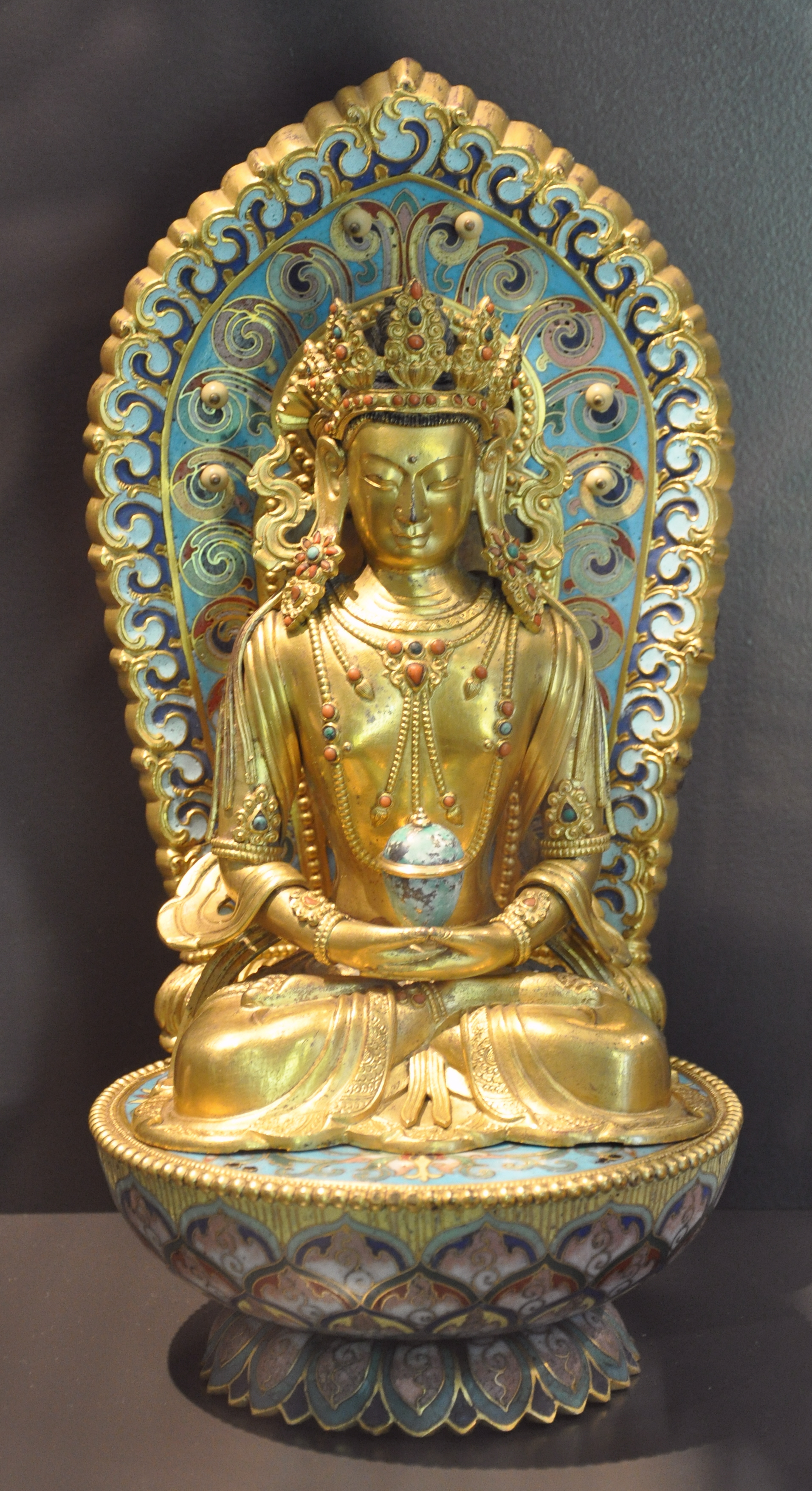 Buddha Amitayu, Mongolei, 18. Jh.; Kupferlegierung, vergoldet, Email cloisonné Museum Rietberg, Zürich; Samlung Berti Aschmann, Inv. Nr. BA 34